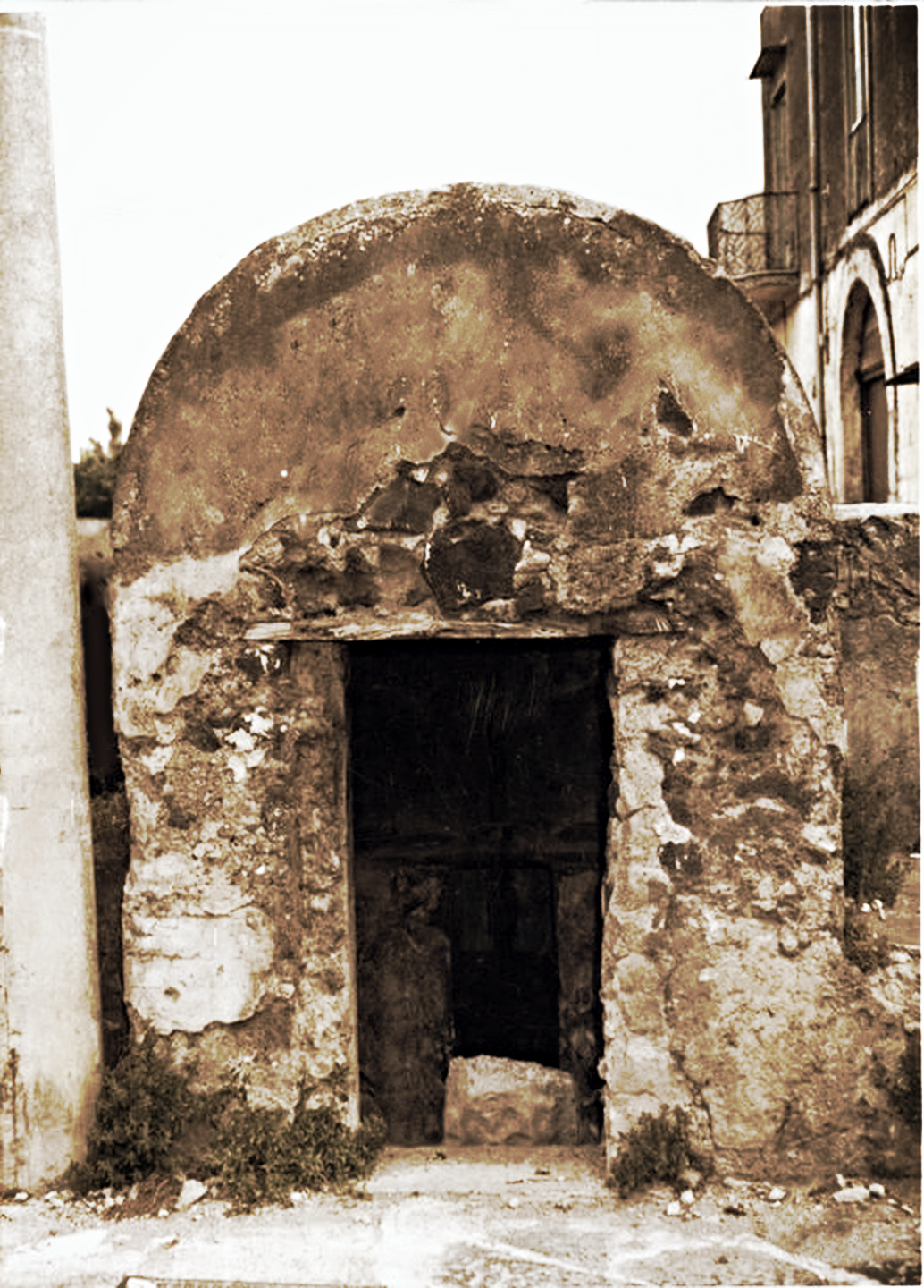 Poggiomarino, fine anni '70. una delle 51 bocca d'irrigamento del Canale Conte Sarno